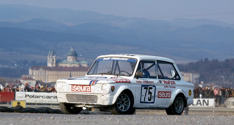 Der Finne Juhani „Jussi“ Kynsilehto mit seinem Singer Chamois Sport (siehe auch Hillman Imp) beim Rallycross-EM-Lauf 1978 auf dem damaligen Leruring in Melk (A).